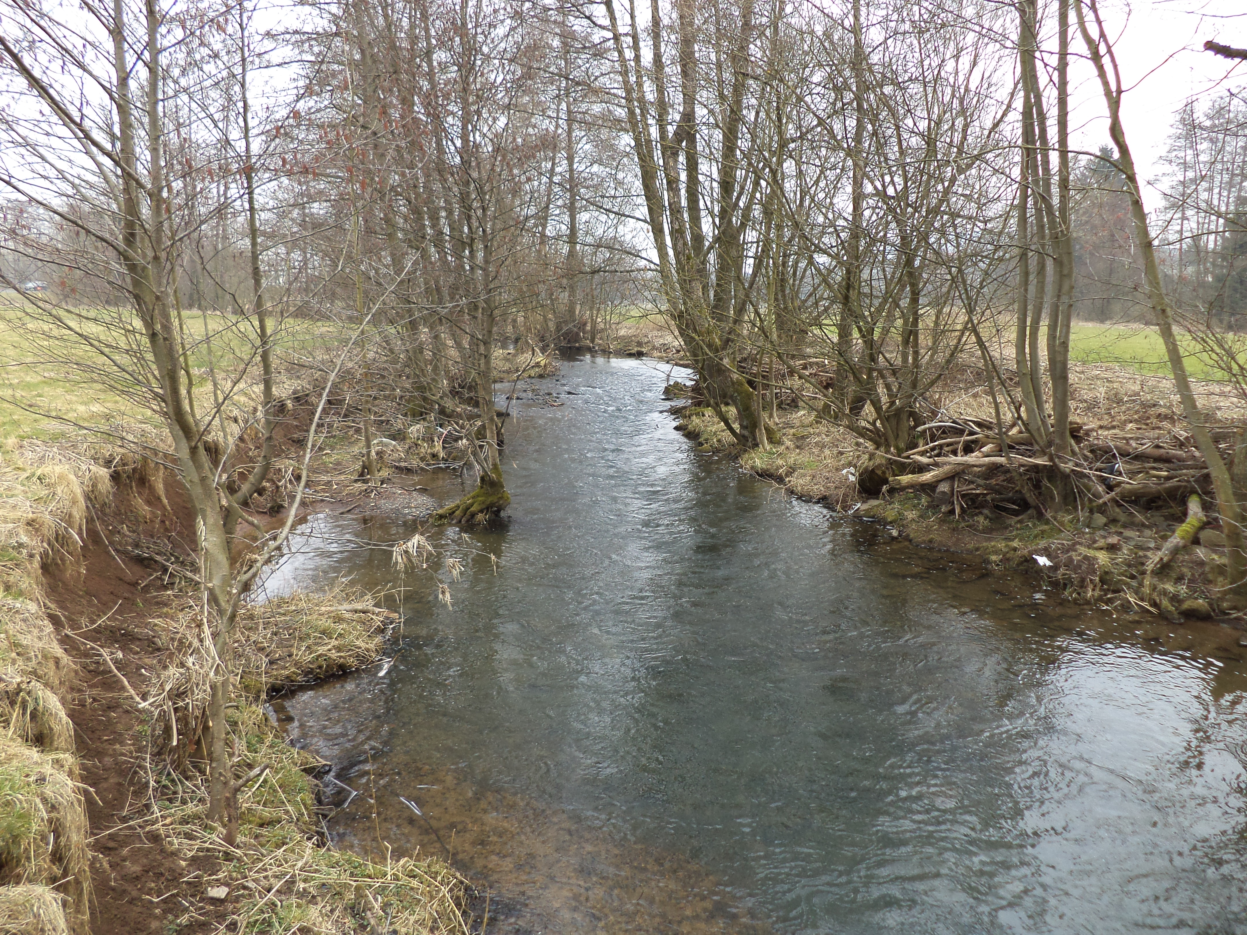 Der Steinaubach in Steinau a.d.Str.